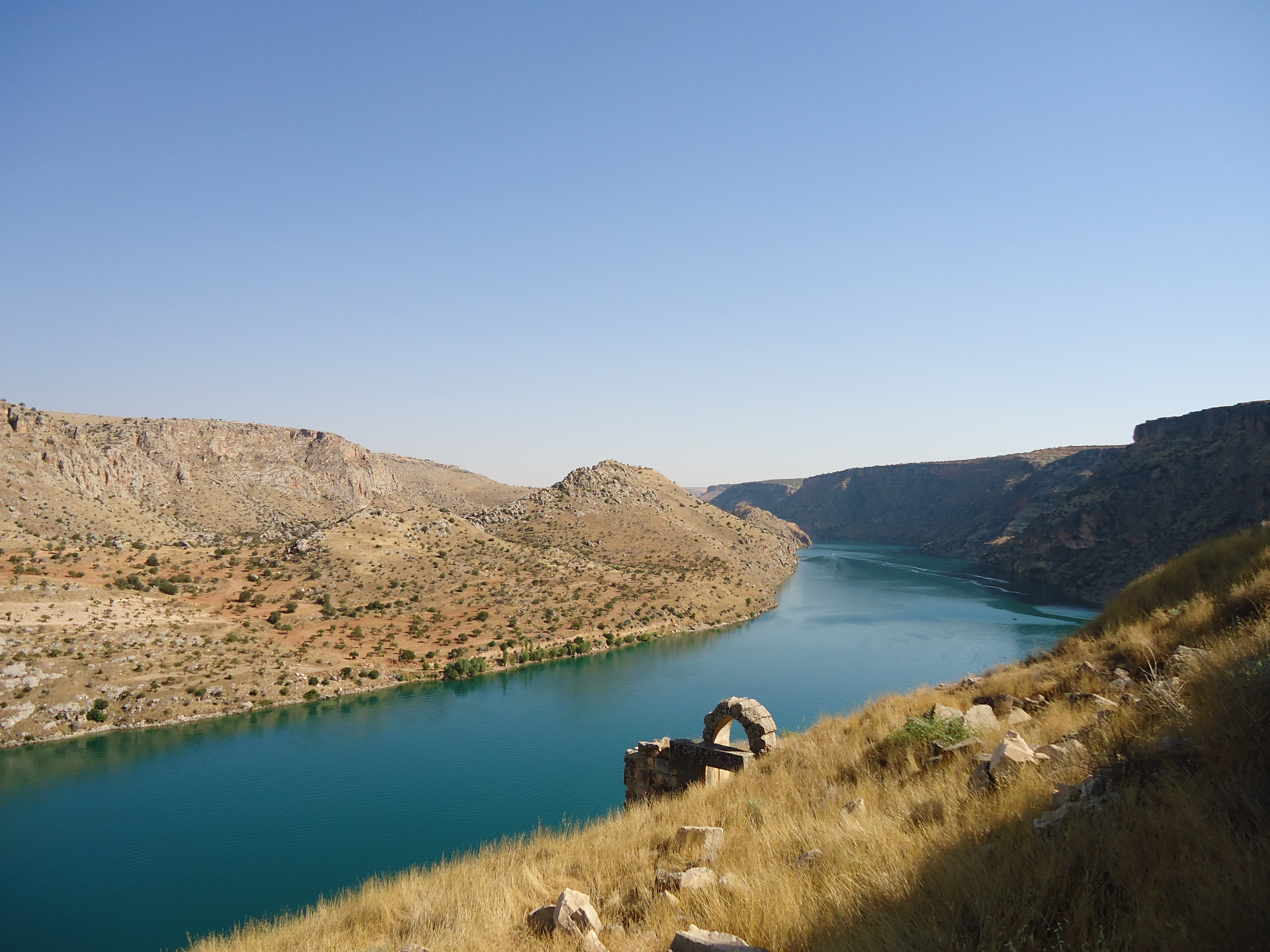 Euphrat nahe Zeugma